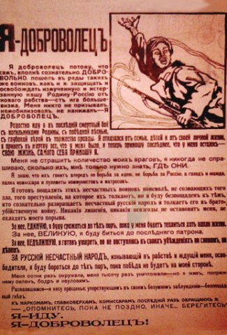 Агитационный плакат "Я-доброволец", Гражданская война в России, 1918-1919 гг.